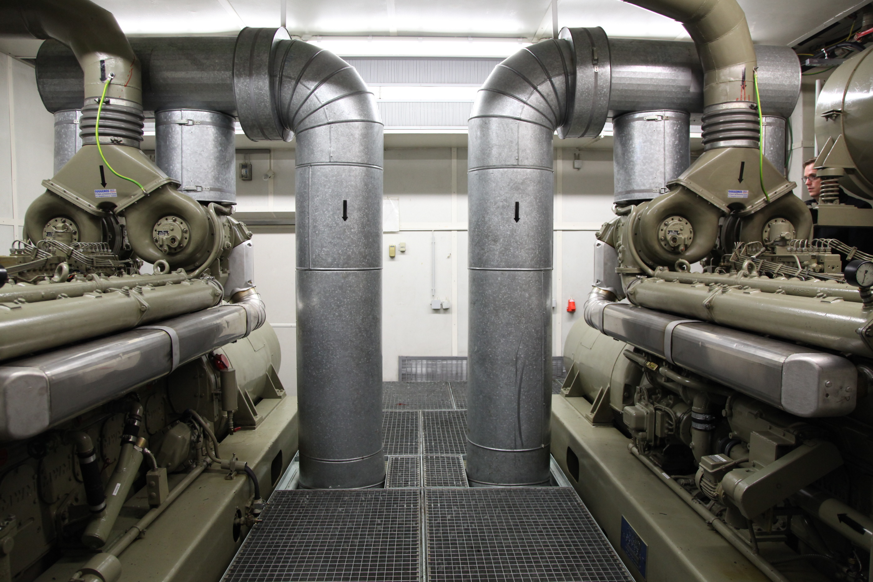 Dieselmotoren als Stromgeneratoren (insgesamt drei)